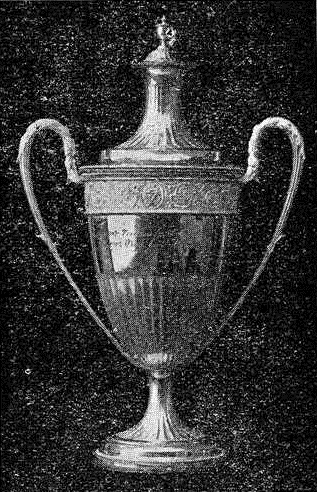 Trofeo do Campionato de Galicia organizado polo Vigo F.C. entre 1905 e 1911. O campionato aínda era oficioso e non oficial, xa que a Federación Galega de Fútbol non organizou o mesmo oficialmente ata 1913. O trofeo foi doado polo rei Afonso XIII, feito que fixo que a prensa da Galiza chamase ó trofeo Copa do Rei.